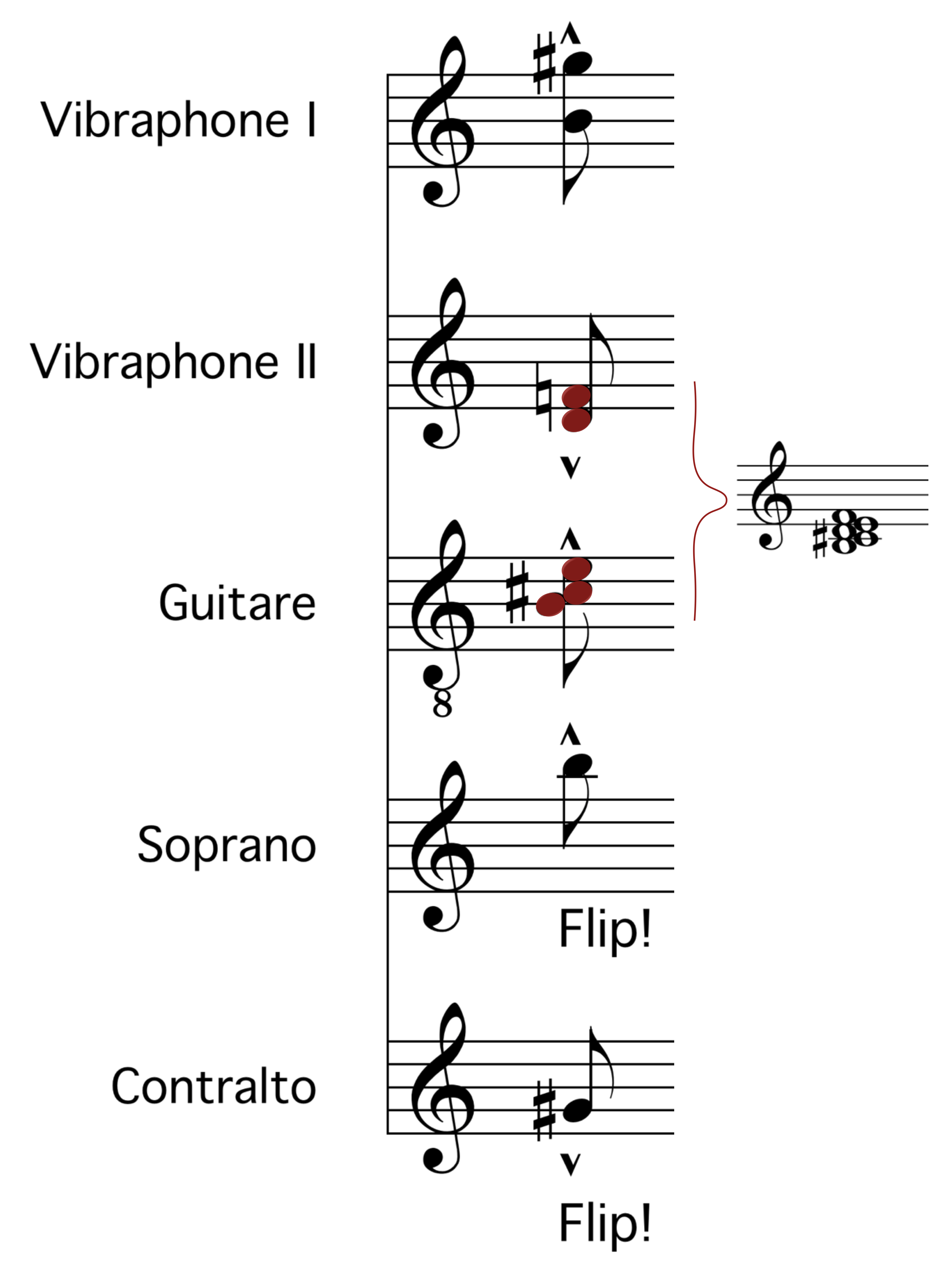 Extrait de la pièce XXII d'Anna Livia Plurabelle d'André Hodeir